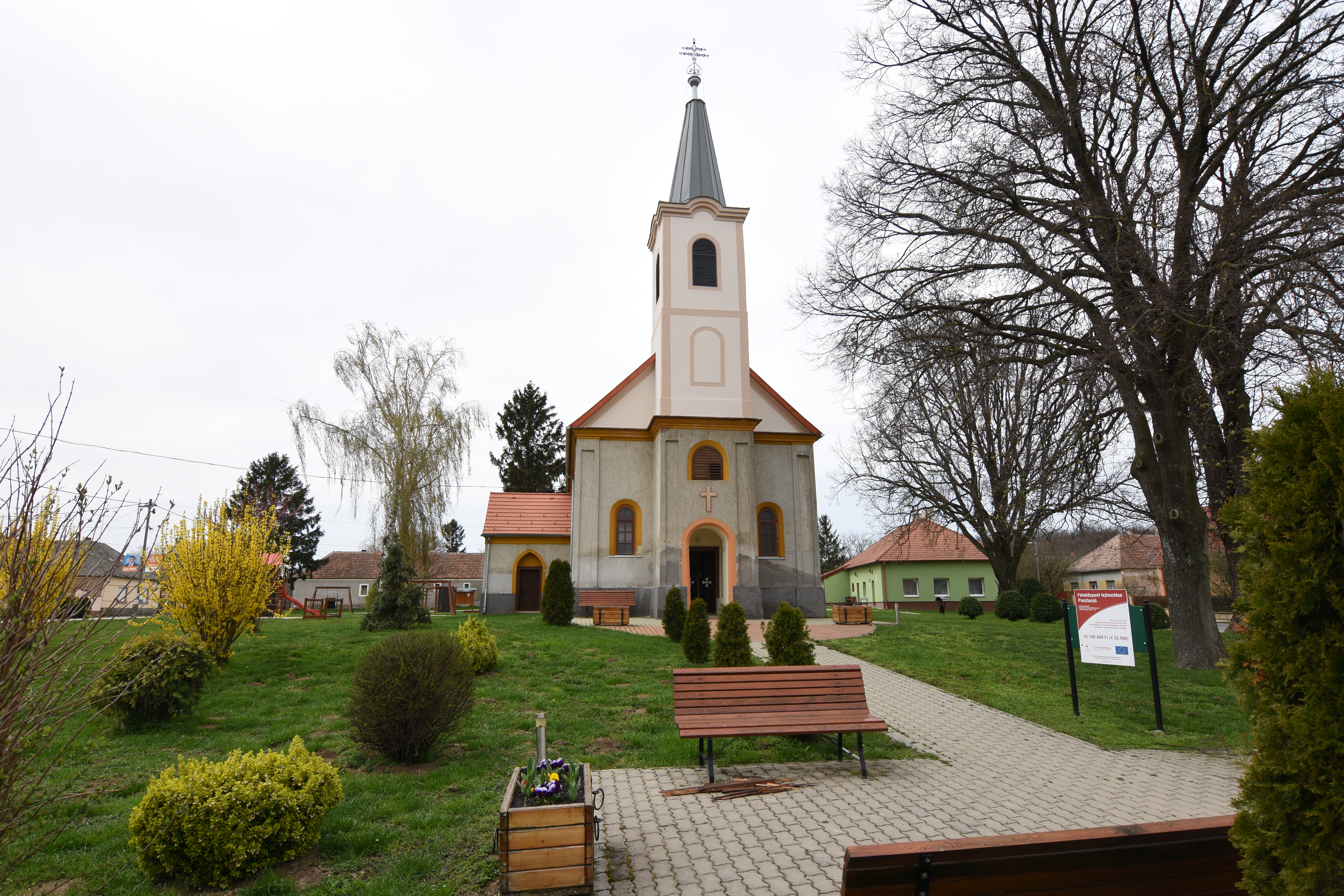 Saint Stephen of Hungary Church Pusztacsó